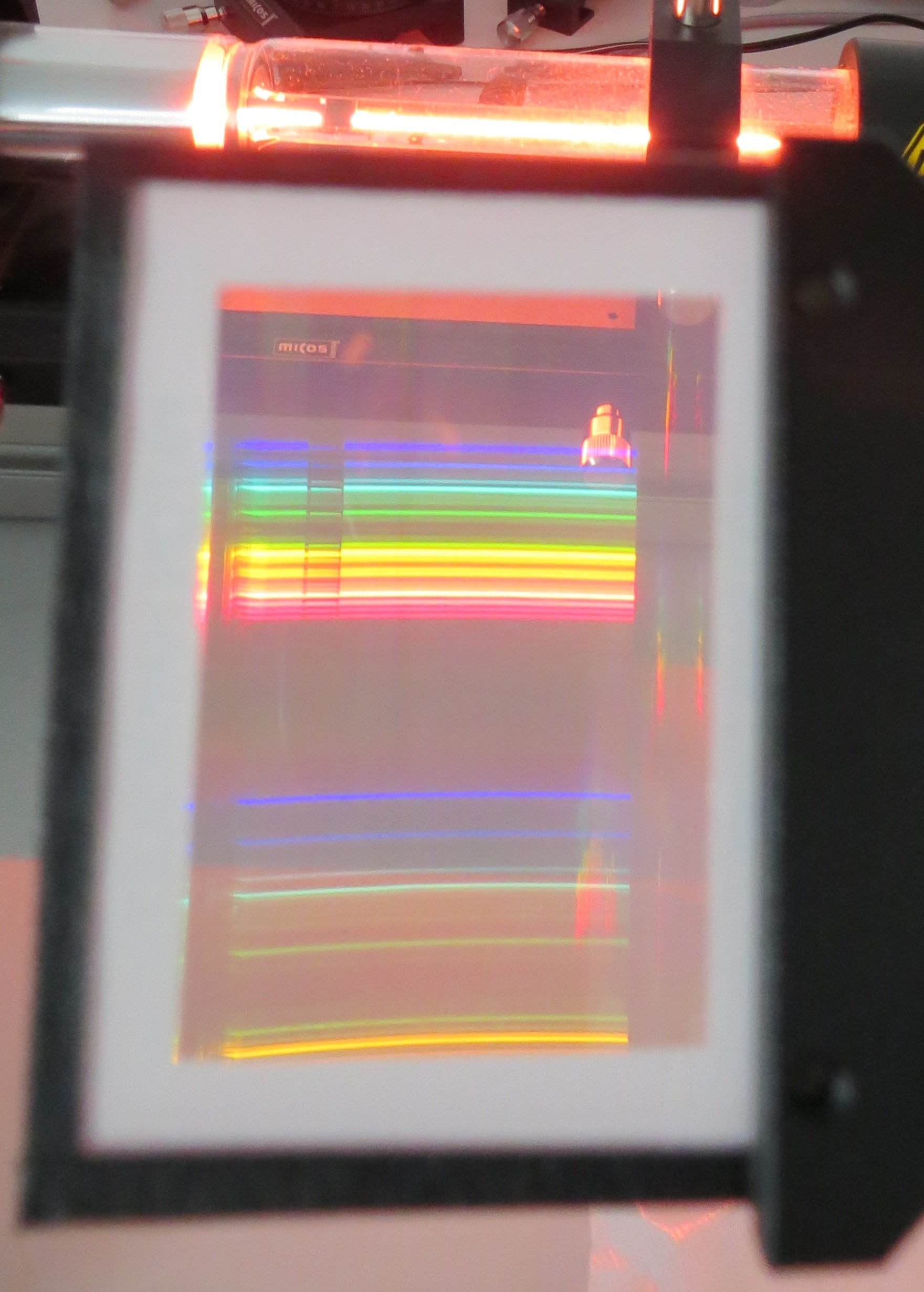 Spektrum einer Helium-Neon-Röhre hinter einem optischen Gitter